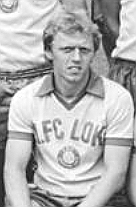 Title: Mannschaftsfoto 1. FC Lok Leipzig Factual corrections and alternative descriptions are encouraged separately from the original description. Additionally errors can be reported at this page to inform the Bundesarchiv. Original historic description: ADN-ZB-Kluge-23.8.83-zin-Leipzig: Die Mannschaft des 1. FC Lok Leipzig für die Fußball-Oberligasaison 1983-84. Vorn v.l.n.r.: Andreas Bornschein, Dieter Kühn, Wolfgang Altmann, Lutz Moldt und Frank Baum. Mitte v.l.n.r.: torhüter Siegfried Stötzner, Rainer Wallek, Hans-Jürgen Kinne, Uwe Zötzsche, Peter Schöne, Mannschaftskapitän Thomas Dennstedt und Torhüter Rene Müller. Hinten v.l.n.r.: Uwe Bredow, Ronald Kreer, Carsten Rost, Andreas Treske, Raymond Haarseim und Hans Richter. Die Elf aus der Messestadt trifft in der ersten Runde des Fußball-UEFA-Pokals am 14.9. (in Bordeaux) und 28.9 (In Leipzig) auf die europäische Spitzenmannschaft von Girondins Bordeaux.